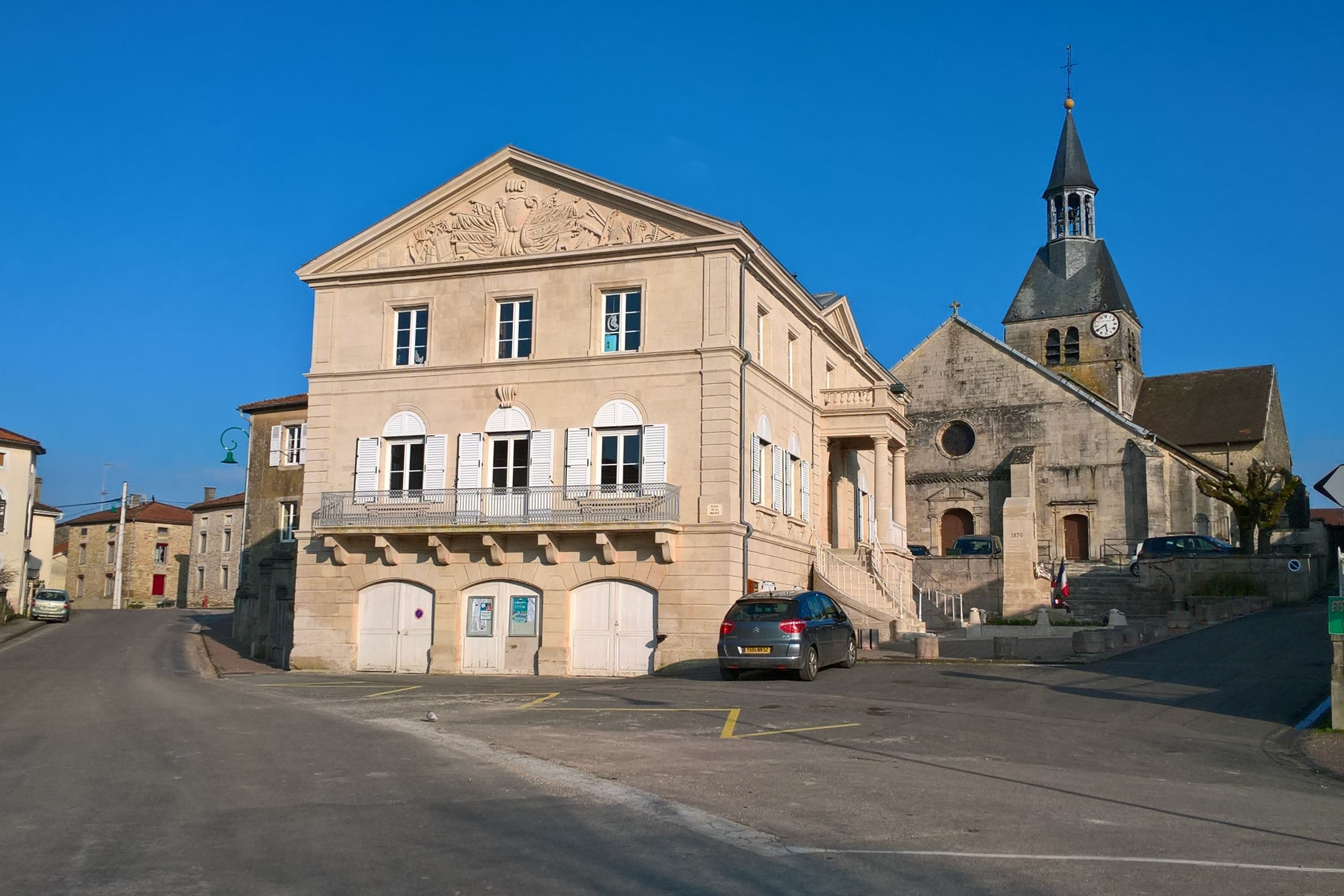 Dommartin-le-Saint-Père, la mairie et l'église.